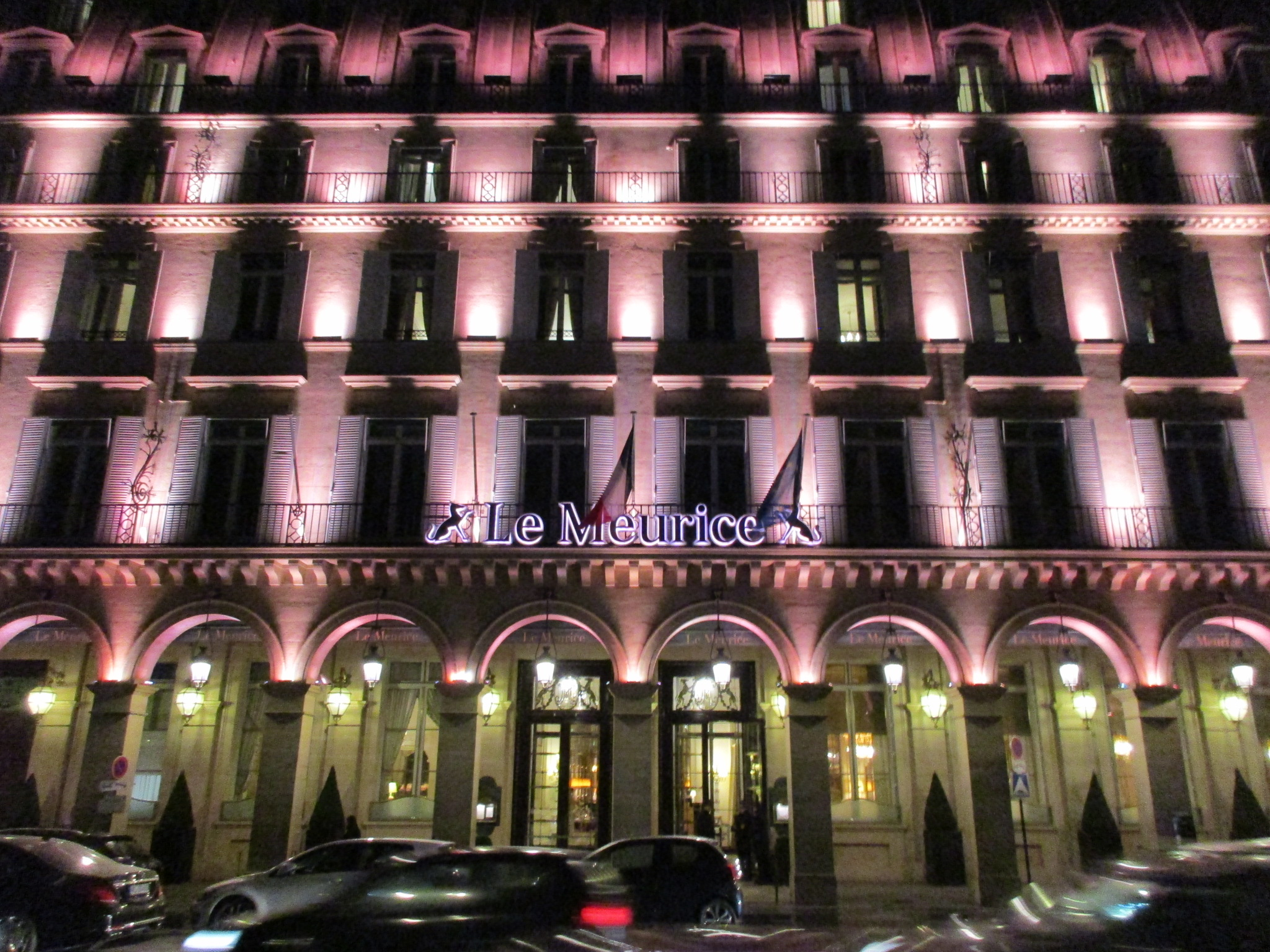 Hôtel Meurice (Paris)